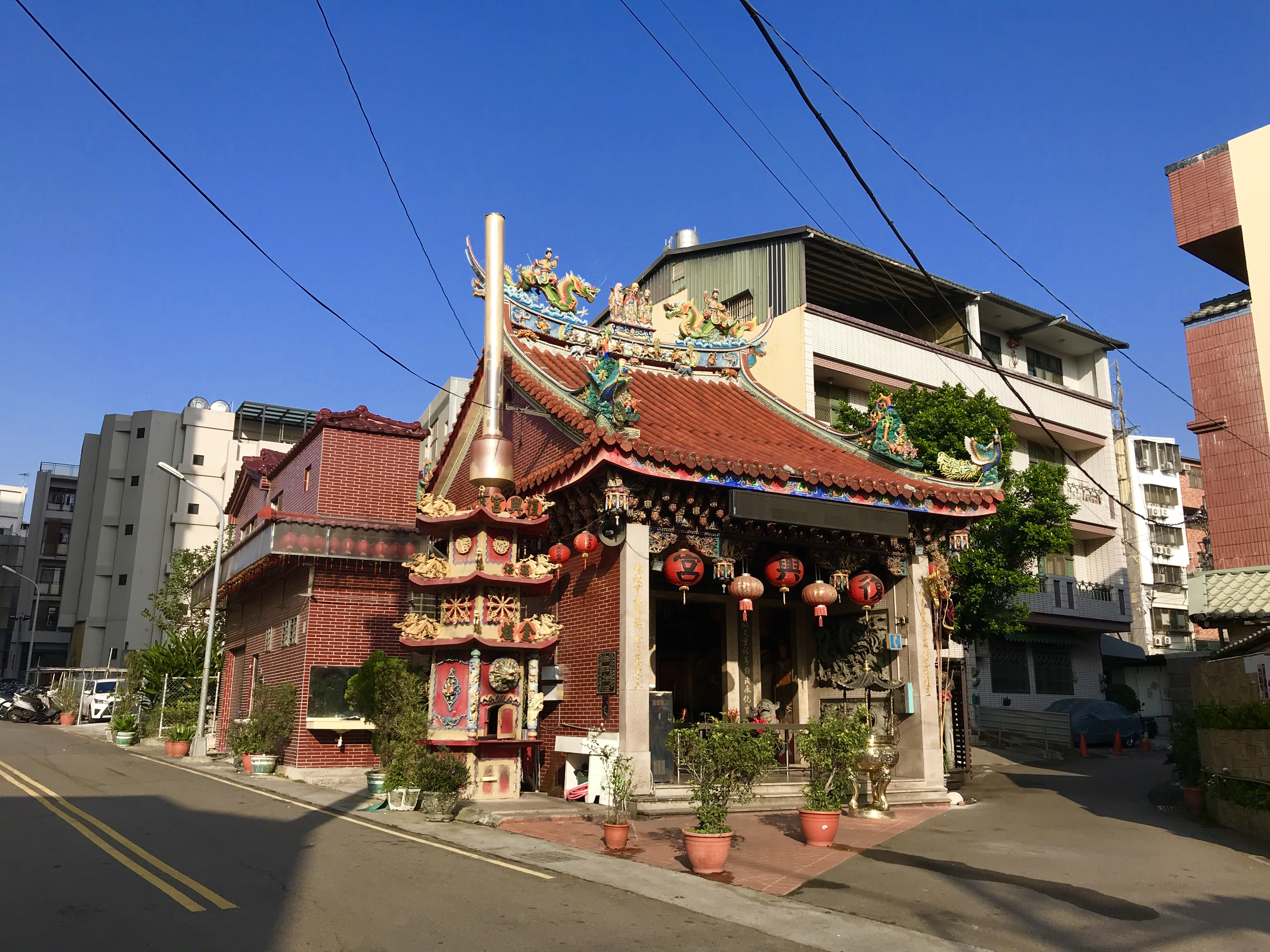 中文（台灣）: 南屯復興宮斜照